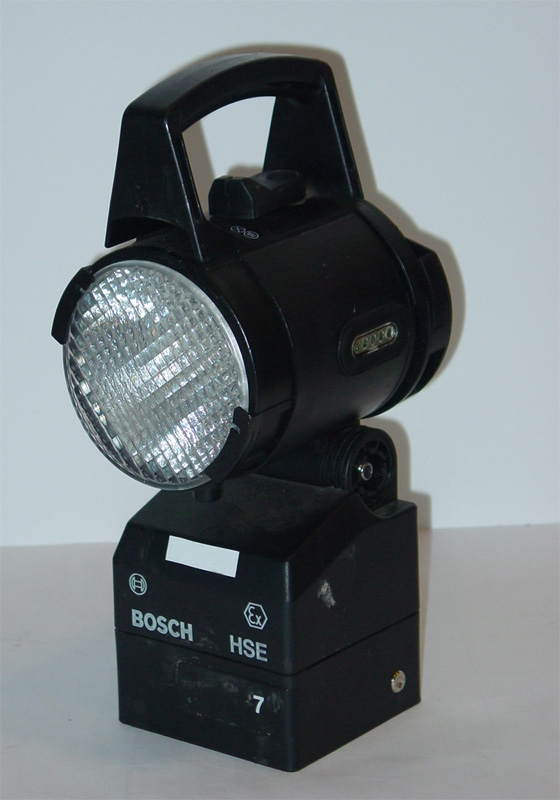 Bild eines herkömmlichen Handscheinwerfer bei der Feuerwehr